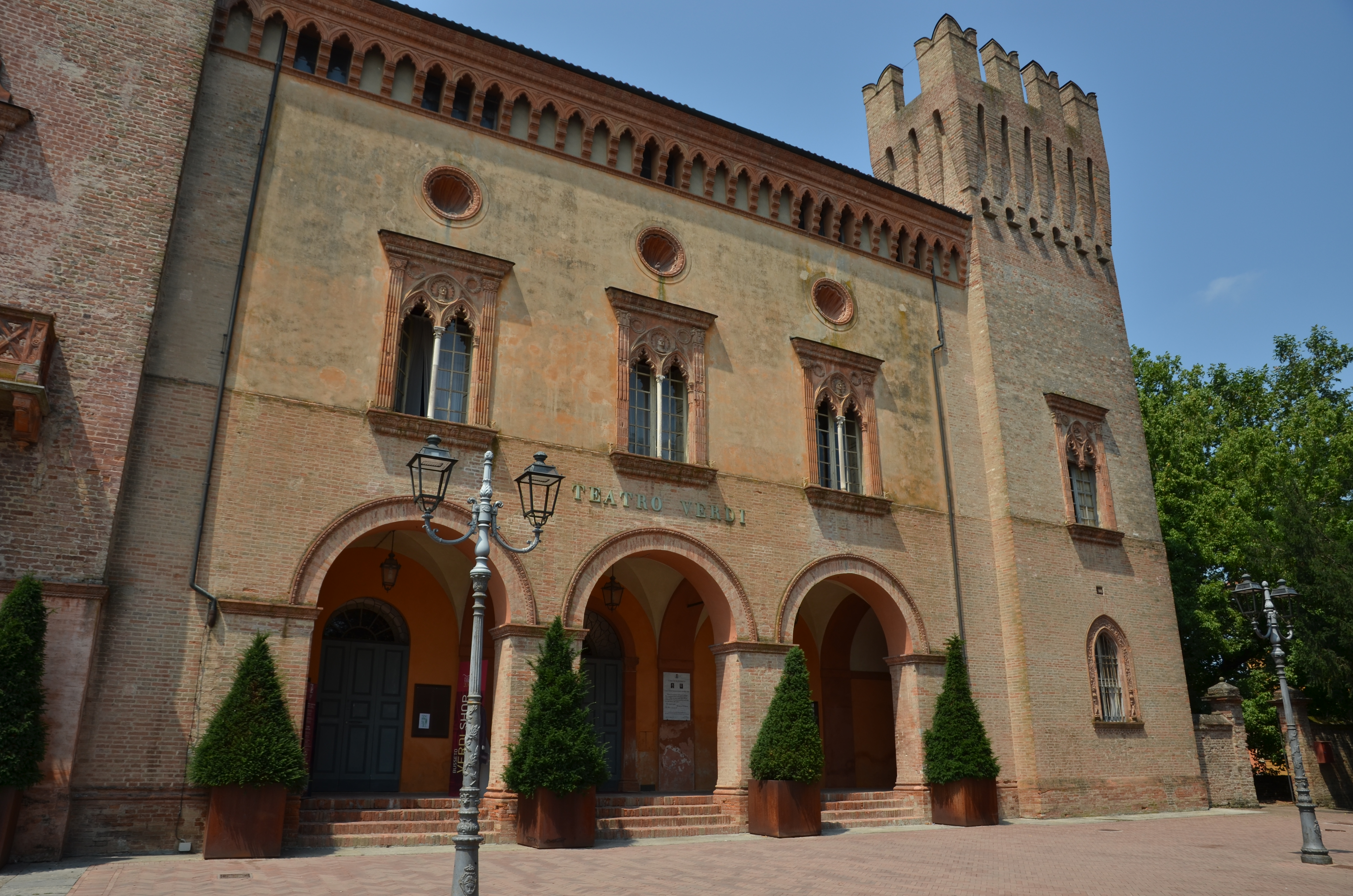 Verdiho divadlo, Busseto - Itálie